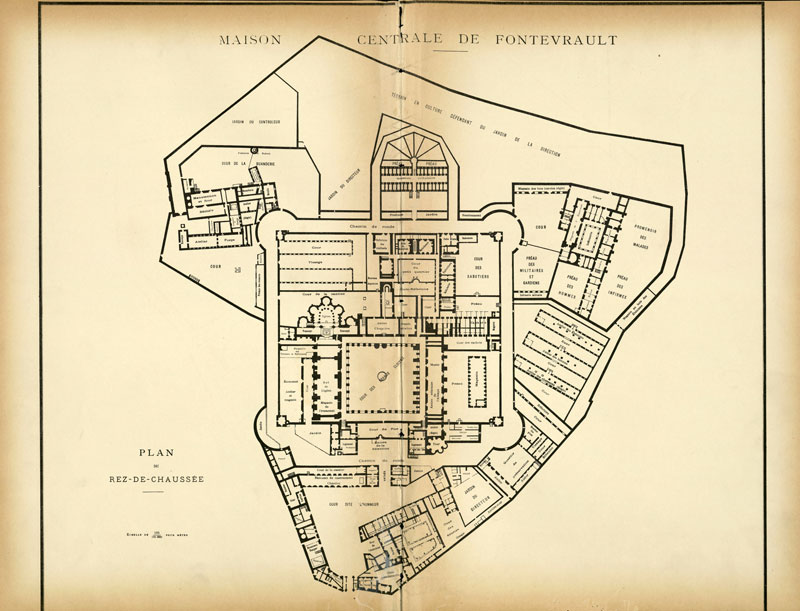 La Maison centrale de FONTEVRAUD (Maine-et-Loire) : plan du rez-de-chaussée, 1895.